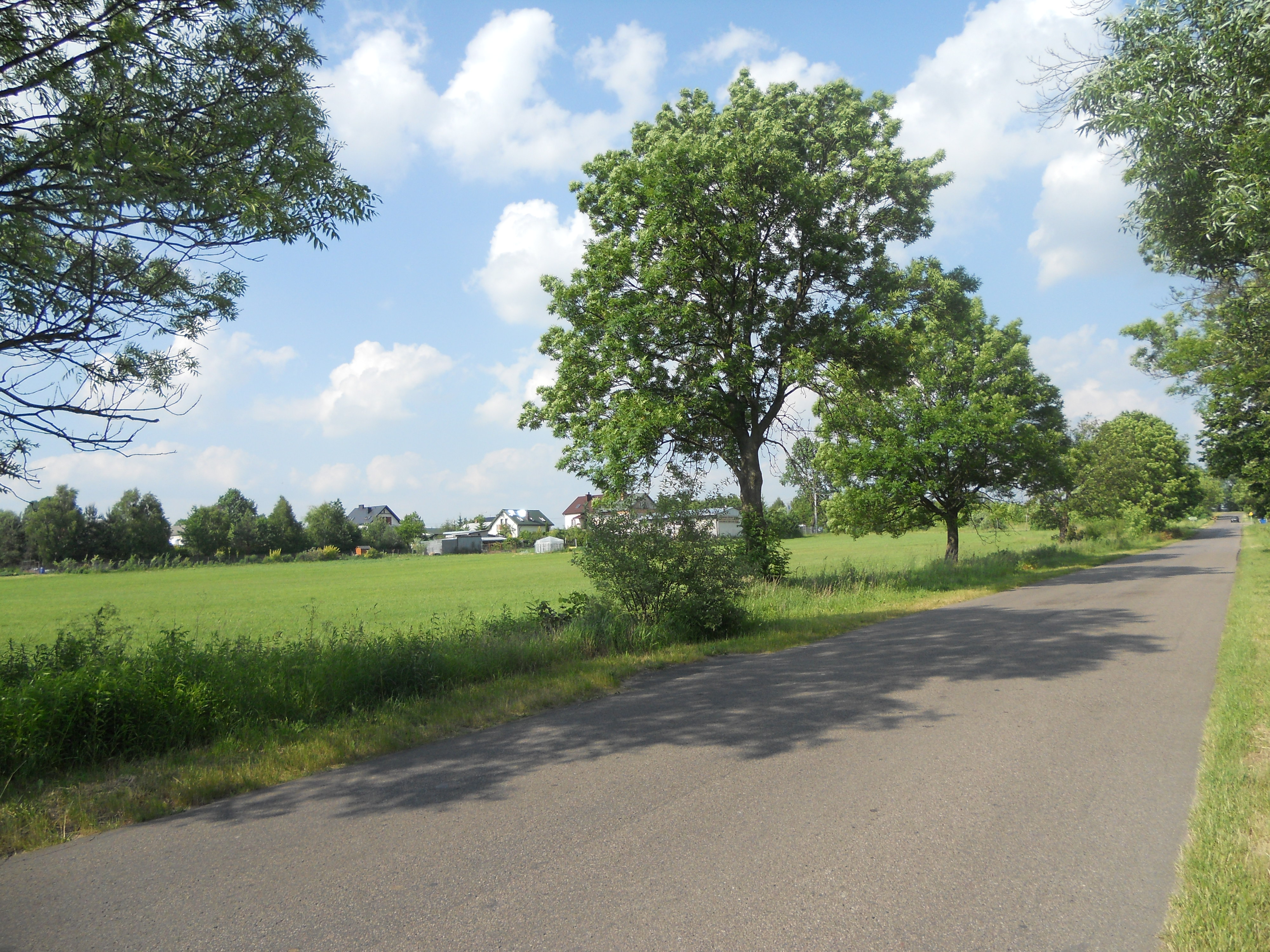 Wieś w gminie Siennica